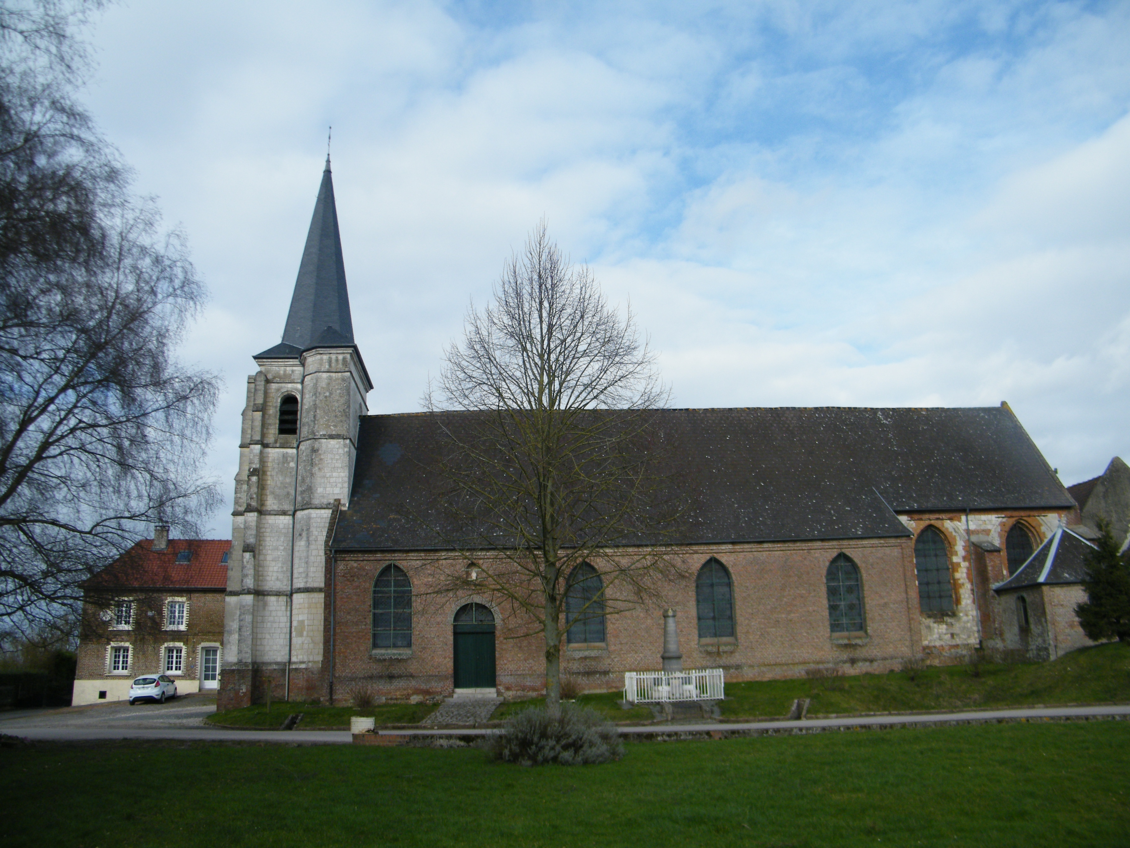 Côté sud de l'église Saint-Jean-Baptiste d'Hiermont, Somme, France.